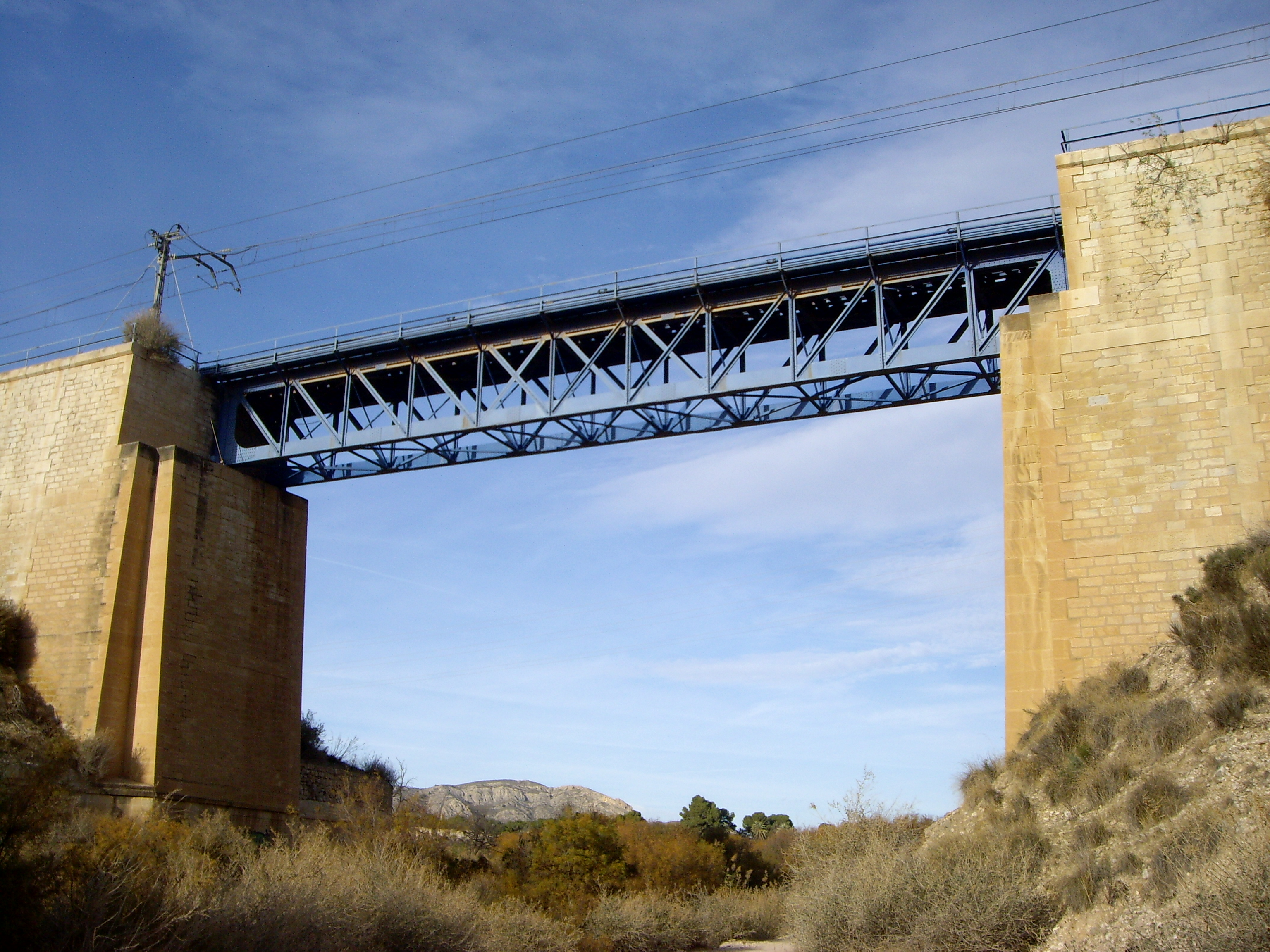 Puente Sambo, ferrocarril, Elda